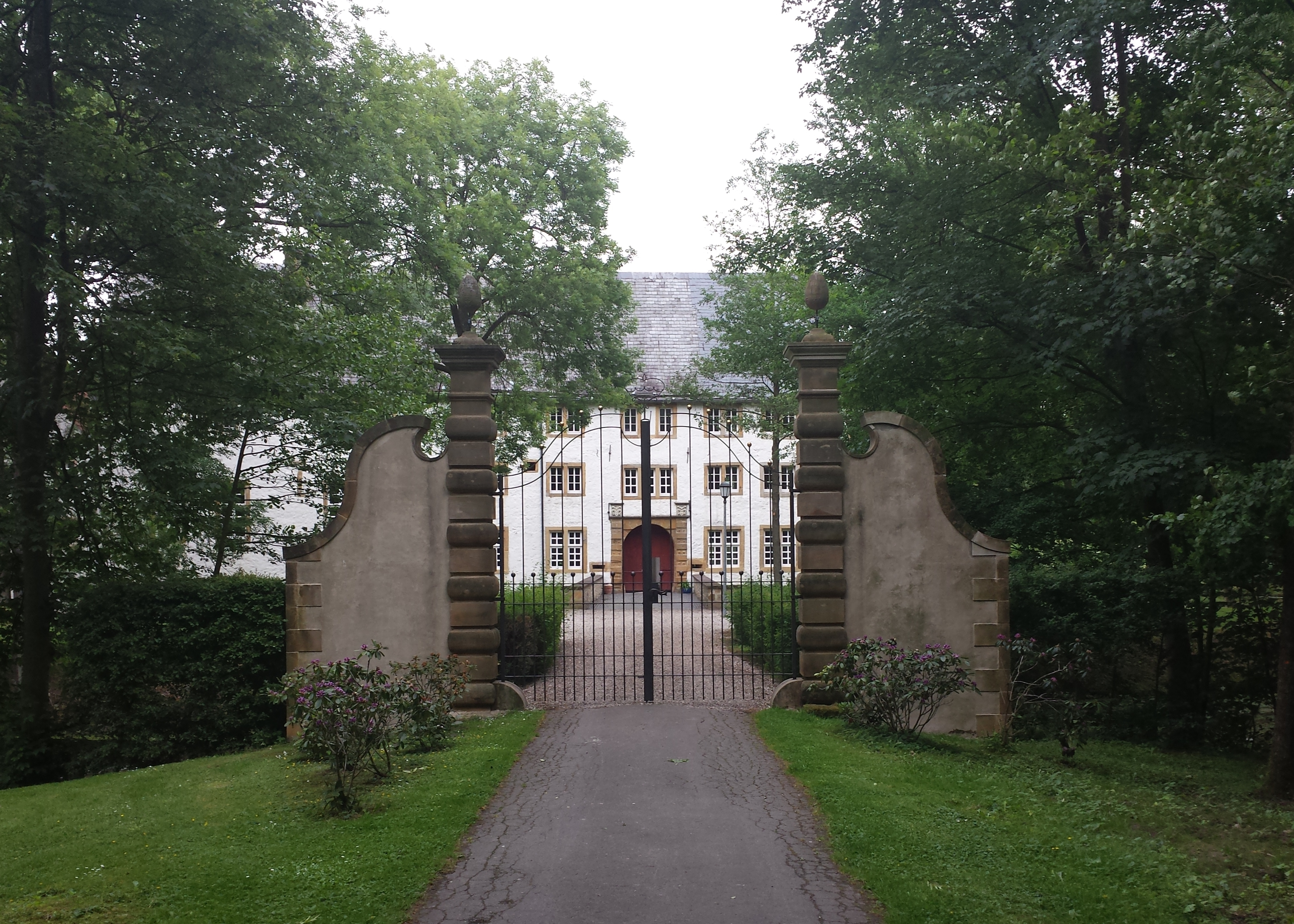 Schloss Königsbrück bei Neuenkirchen (Melle) von Westen aus gesehen